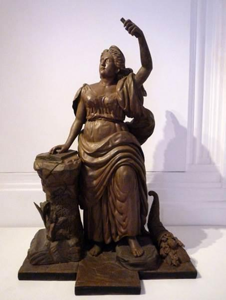 Escultura, talla directa de bulto redondo elaborada en madera de cedro. Año: 1877 Colección Nacional.